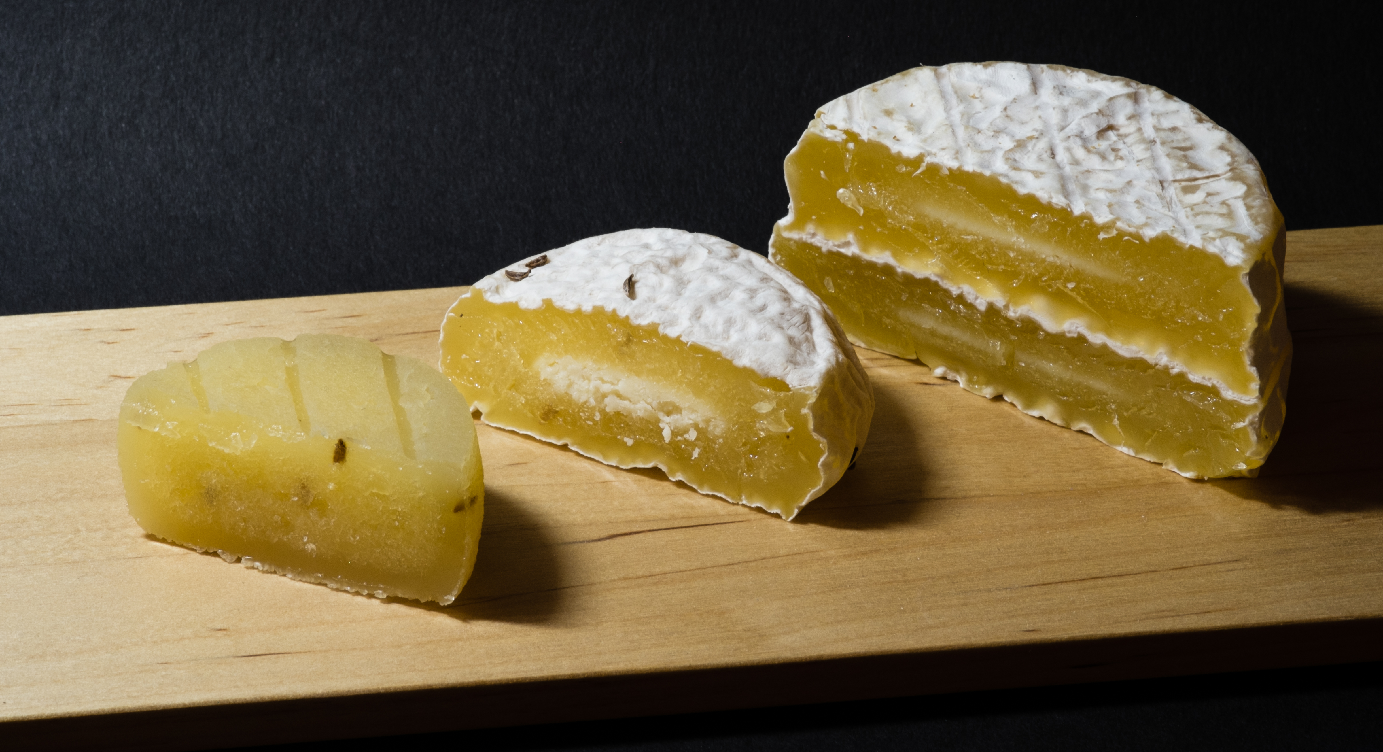 diverse Sauermiclhkäse; von links nach rechts: Harzer Rolle, Harzer Thekentaler, Korbkäse